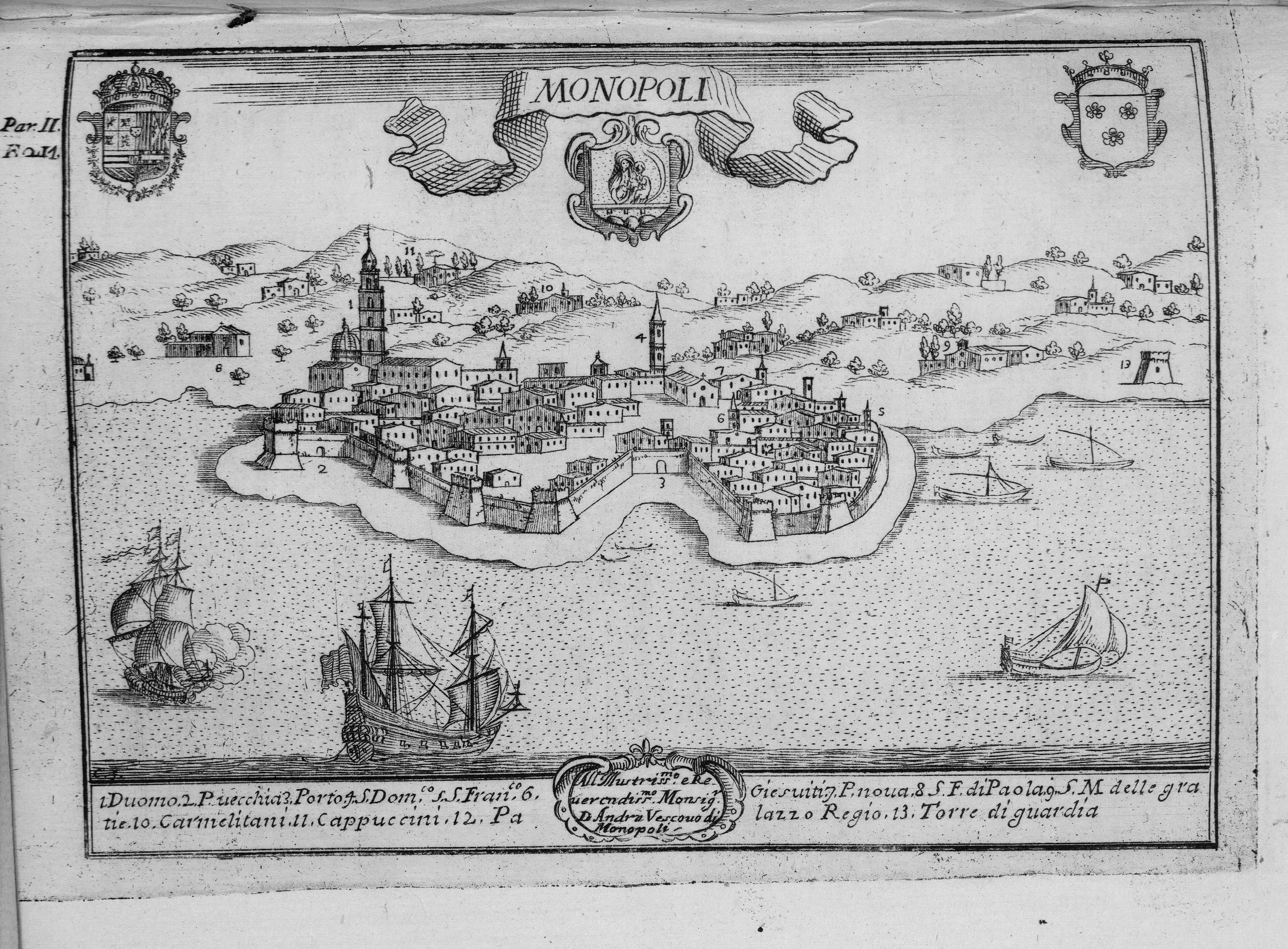 Autor: Pacichelli, Giovanni Battista, 1641-1702 Descripción bibliográfica: Il regno di Napoli in prospettiva : diviso in dodeci provincie, in cui si descrivono la sua Metropoli Fidelissima città di Napoli ... Opera postuma divisa in tre parti / dell'abatte Gio. Battista Pacichelli ; Parte prima [-terza] ... Del regno di Napoli in prospettiva / dell'abate Pacichelli. Parte prima. - In Napoli : nella Stamperia di Michele Luigi Mutio, 1703. - v. : principalmente il.; 4º . - Inic. adorn. y frisos dec. - Grab. calc. y h. pleg. grab. calc. de mapas de Cassianus de Silva. Ilustrador: Cassiano De Silva, Francesco, il. Impresor: Muzio, Michele Luigi, imp. Lugar de impresión: Italia. Nápoles Localización: Vea la ilustración en su contexto